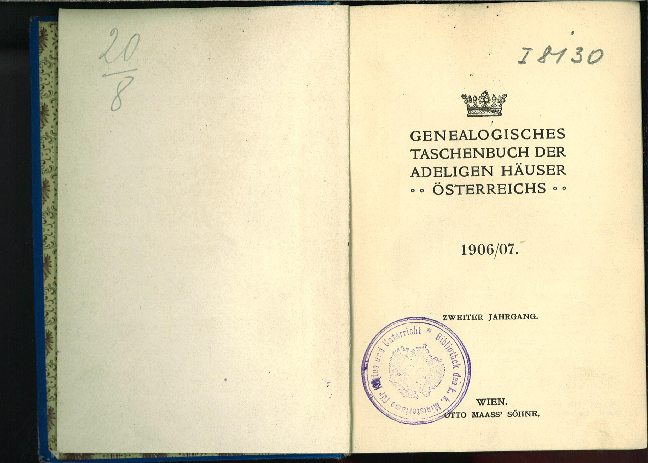 Cover of the Genealogisches Taschenbuch der adeligen Häuser Österreichs from 1906/07